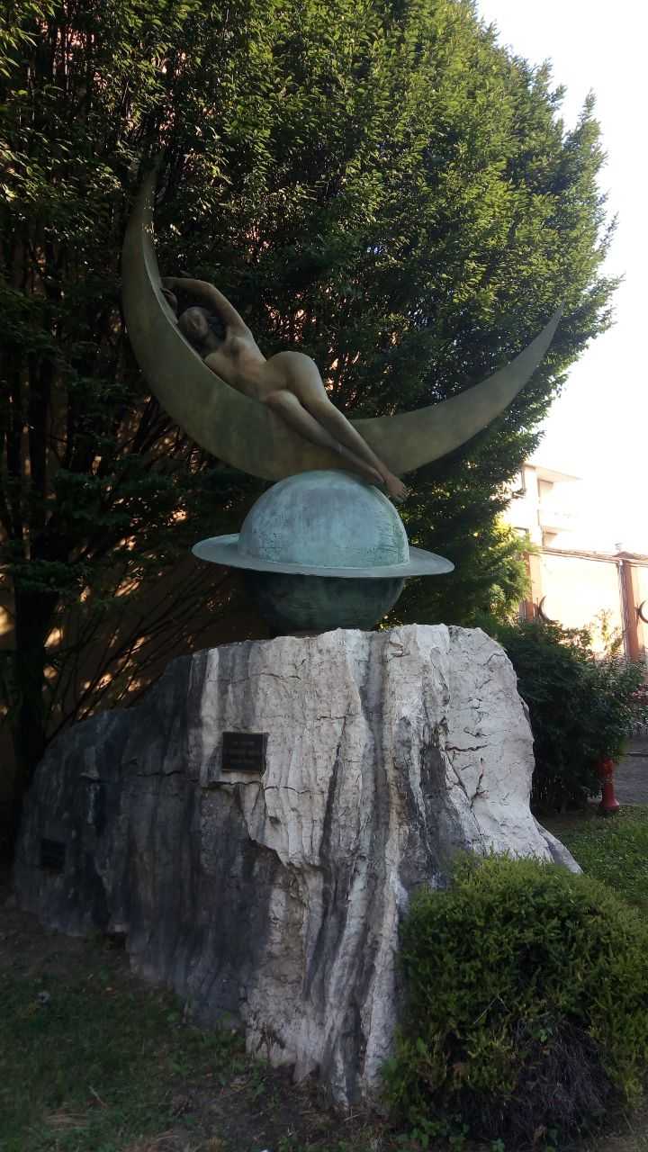 Monumento dedicato a Georges Méliès a Conegliano (TV).